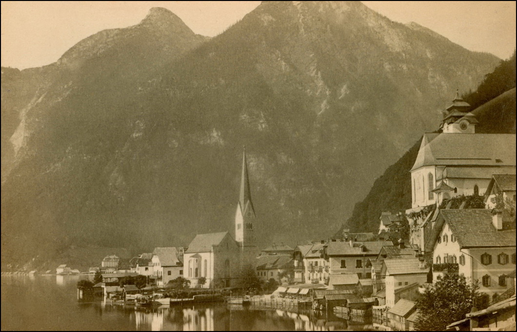 Hallstatt 1899. pogled sa sjevera